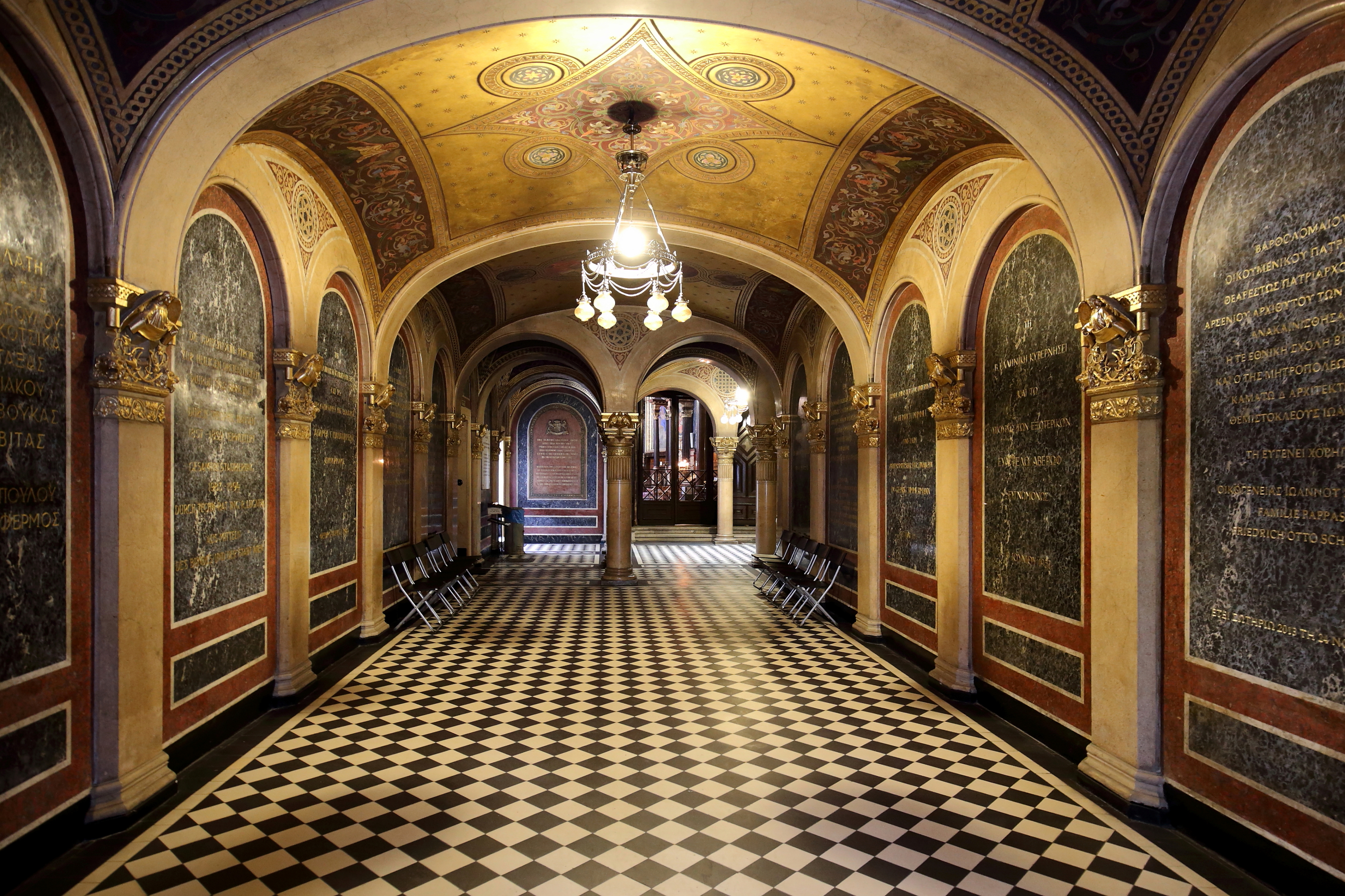 Vorbaudurchgang zur griechisch-orthodoxen Kirche zur Heiligen Dreifaltigkeit im 1. Wiener Gemeindebezirk Innere Stadt. Nachdem von 1782 bis 1787 von Peter Mollner die Griechenkirche gebaut wurde, wurde von 1858 bis 1861 nach Plänen des Architekten Theophil von Hansen ein in byzantinischen Formen gehaltener Vorbau mit einem achteckigen Turm und kuppeliger Haube errichtet.